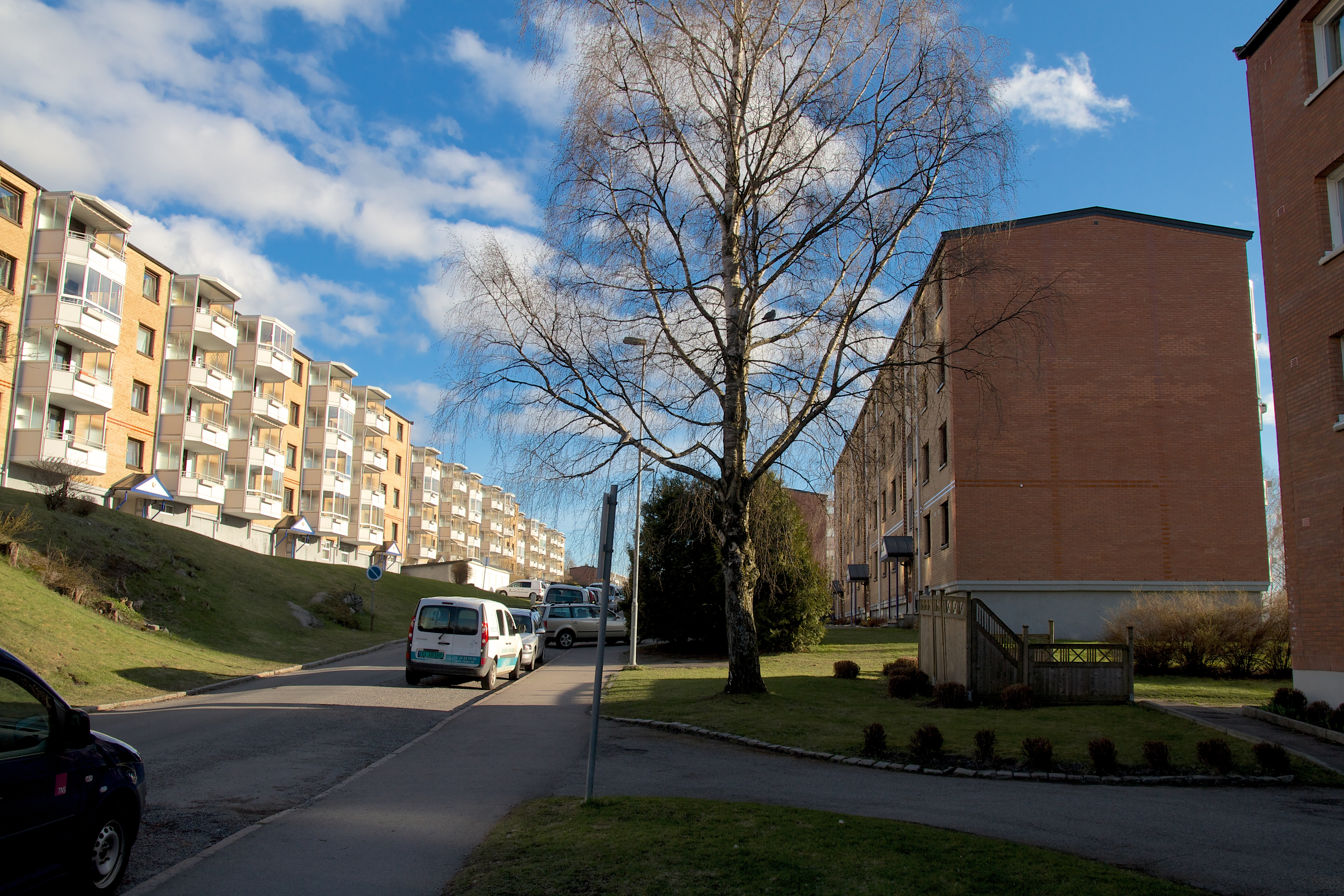 Bølerskrenten på Bøler i Oslo.